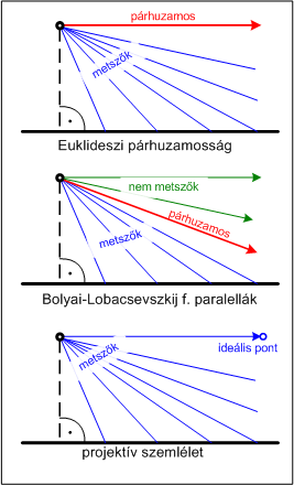 Párhuzamossági szög három geometriában